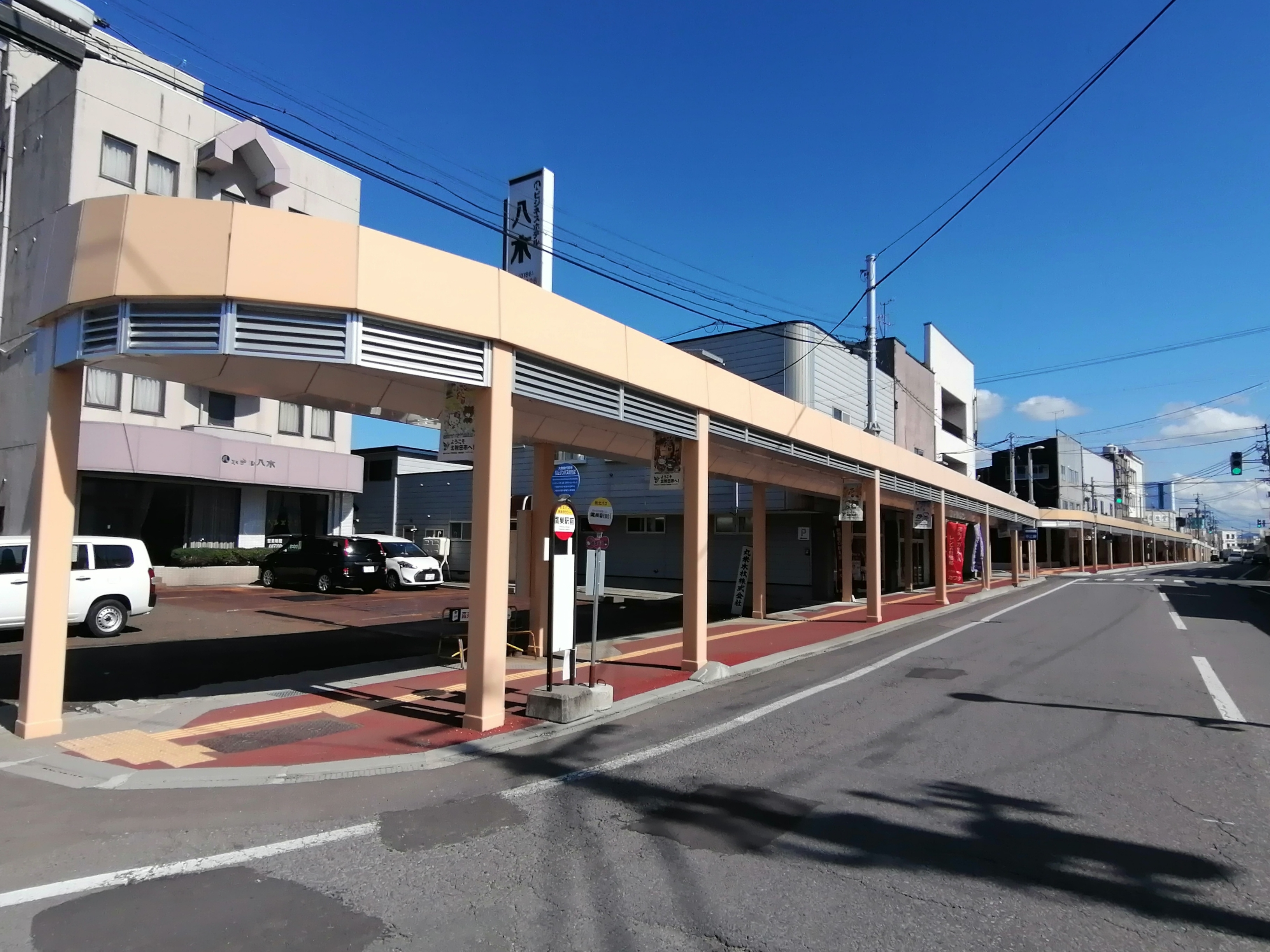 鷹巣駅前商店街：北秋田市材木町